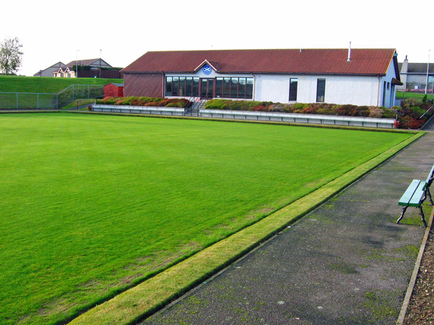 Drumoak and district bowling green, Drumoak, Aberdeenshire